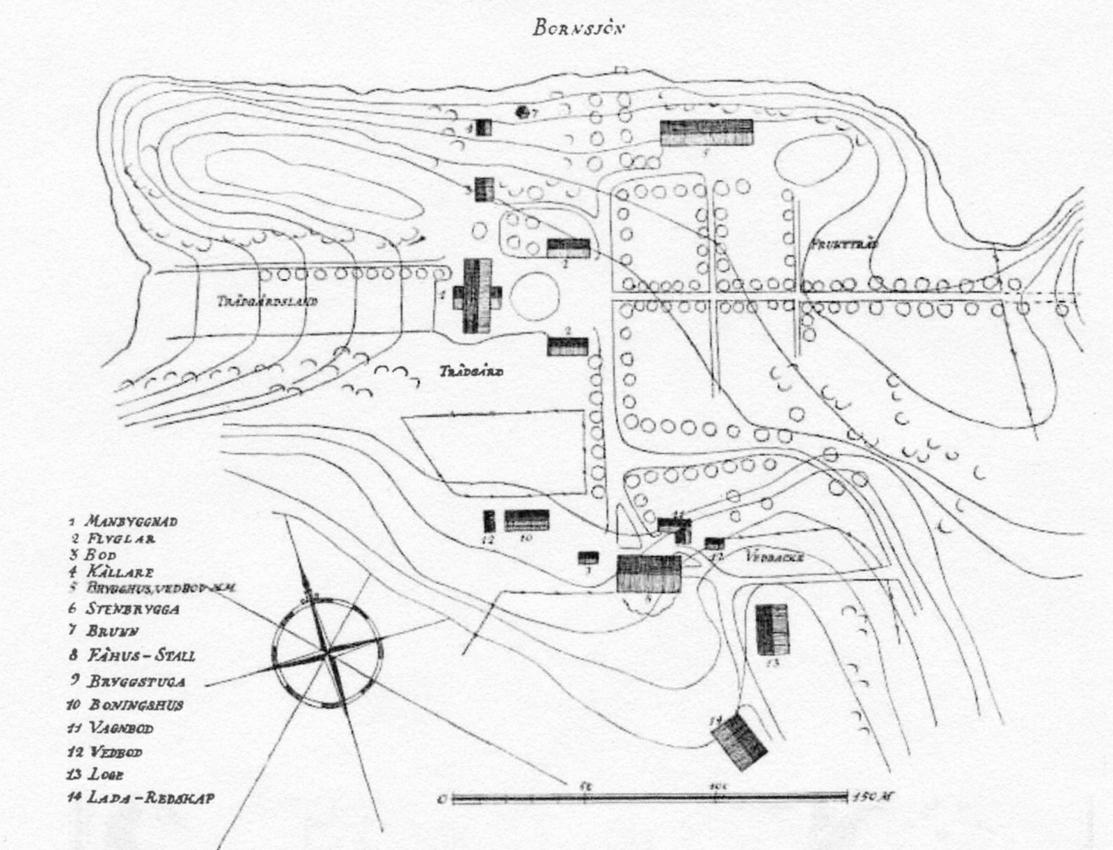 Skårby gård, situationsplan 1920-tal